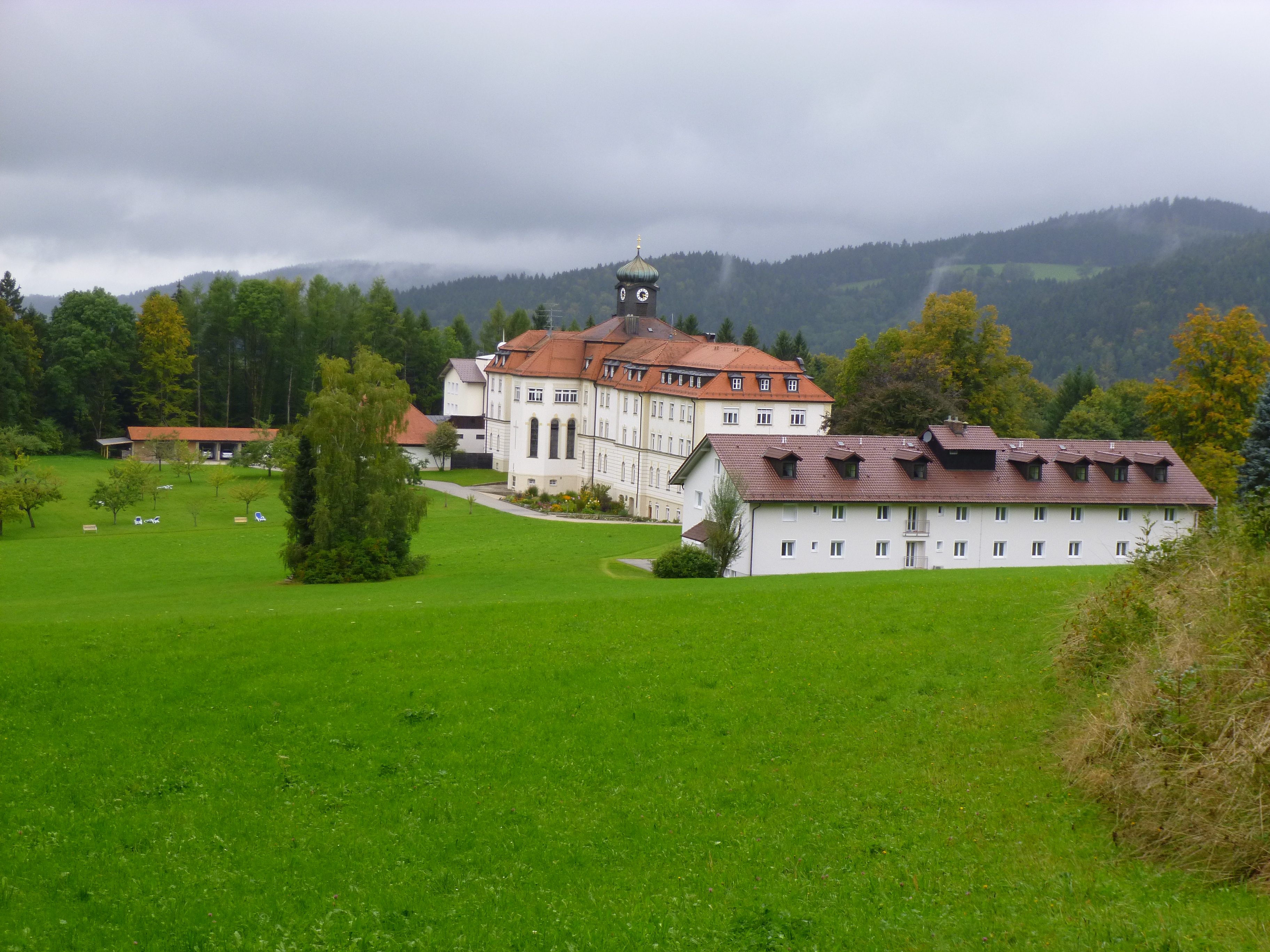 Kloster der Barmherzigen Brüder in Kostenz, Gemeinde Perasdorf. Das Kloster wird heute als Tagungs- und Erholungsheim, sowie als Kinderheim genutzt.This is a photograph of an architectural monument.